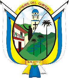 stemma della citta colombiana di salento